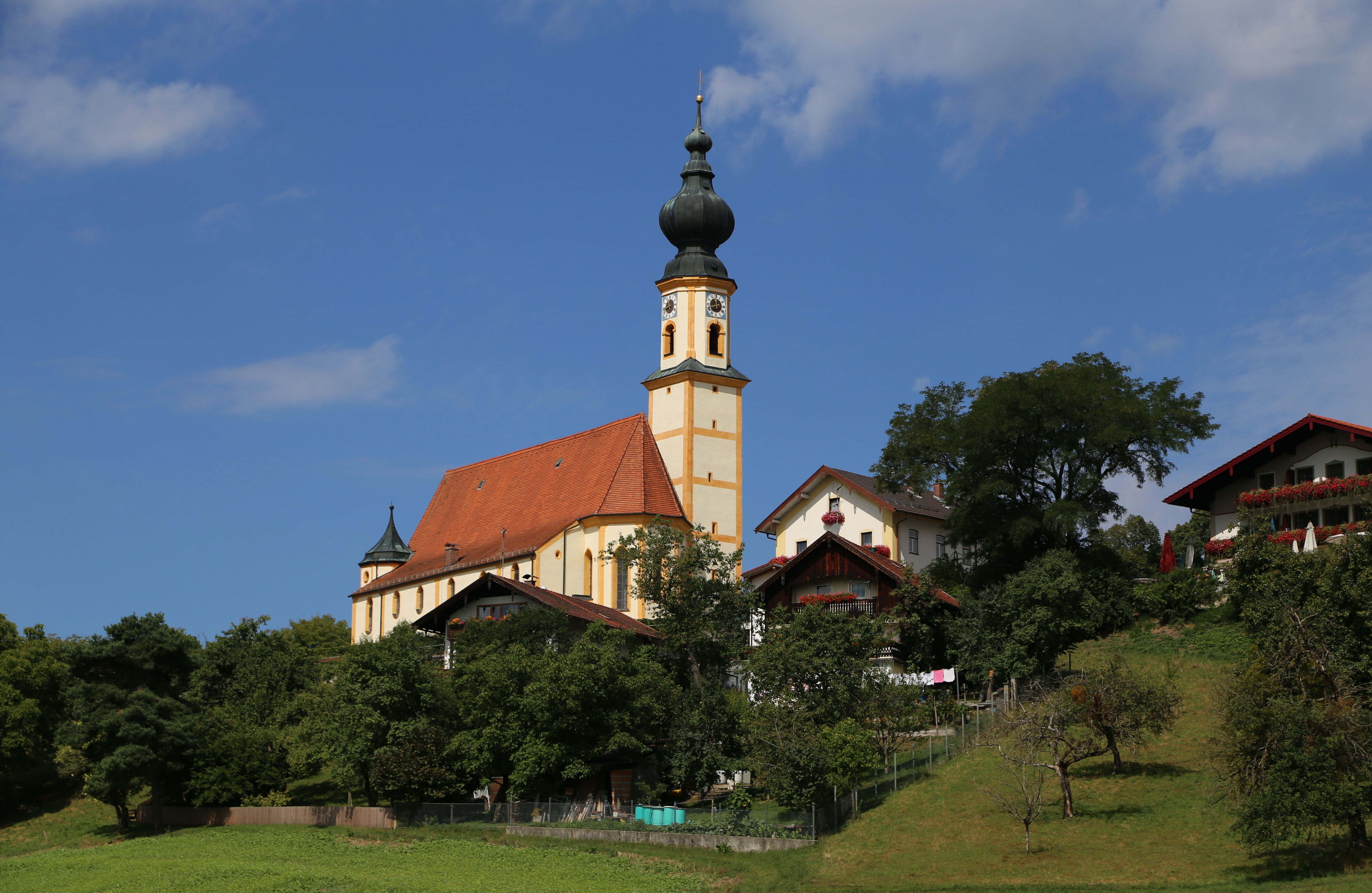 Kirchplatz 2, Höslwang; Kath. Pfarrkirche St. Nikolaus, Saalbau mit Satteldach, Nordturm mit Zwiebel, eingezogenem Chor und südlichem doppelstöckigen Anbau als Oratoriengang (Antoniuskapelle von 1693), spätgotisch, im Kern 15. Jh., barocker Ausbau 1734 durch Martin Pöllner, 1740 Turmoberbau, 1922 Verlängerung mit baulicher Verbindung zum westlichen Pfarrhof; mit Ausstattung.